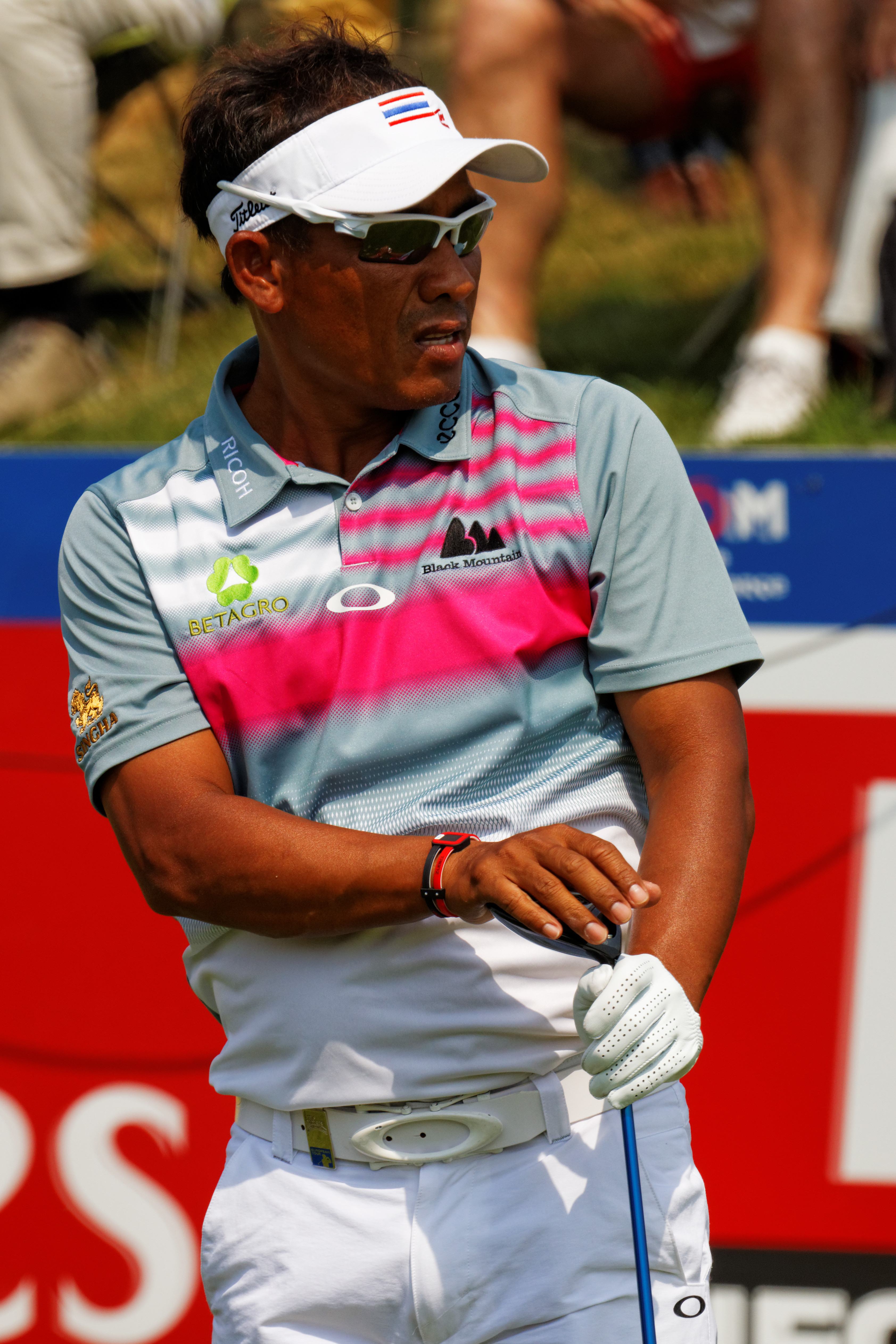 Photo prise lors de l'Alstom - Open de France 2015 à St Quentin en Yvelines